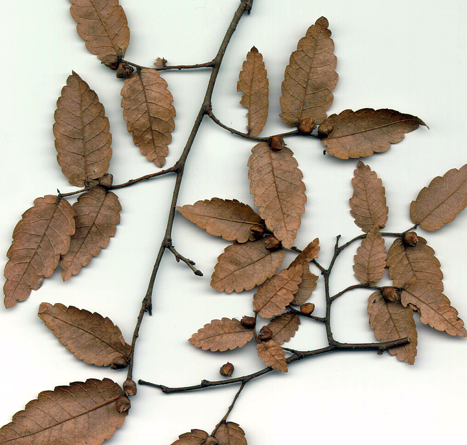 Гранчице са плодовима кавкаске зелкове, Арборетум, Београд (аутор: Михаило Грбић).